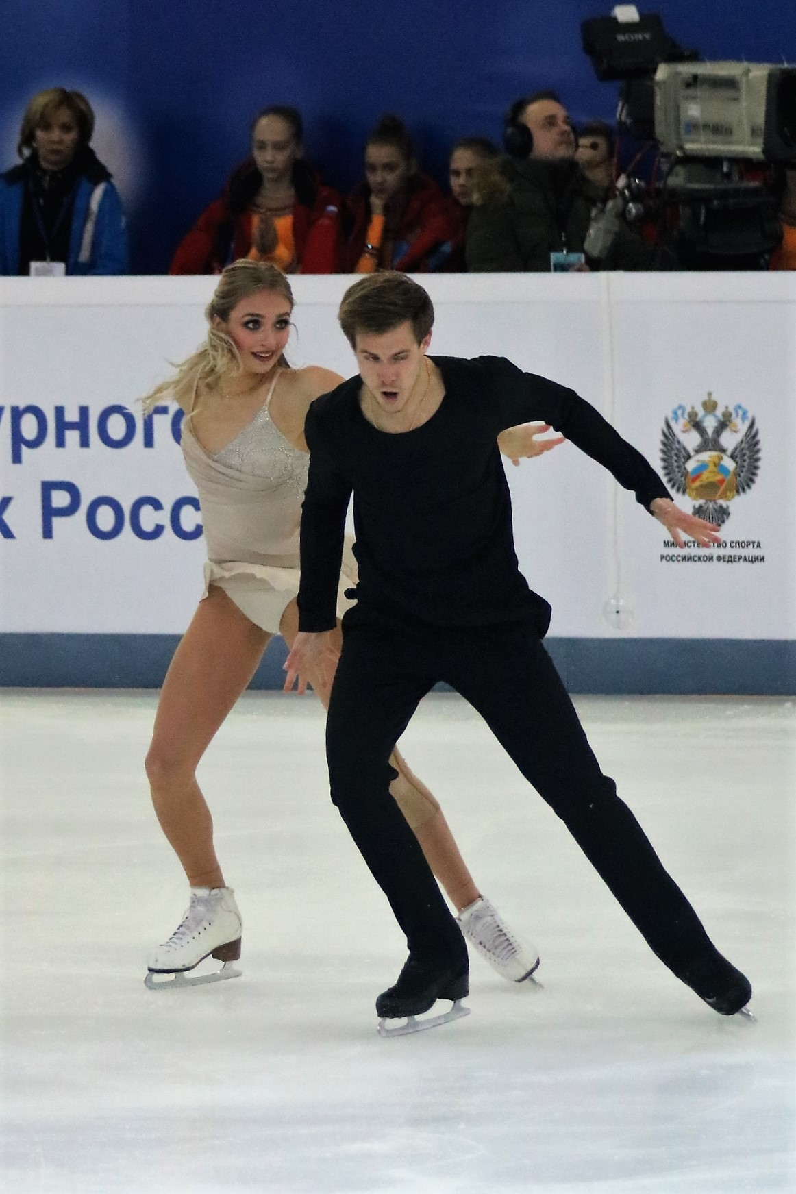 Виктория Синицина / Никита Кацалапов на чемпионате России по фигурному катанию на коньках 2019